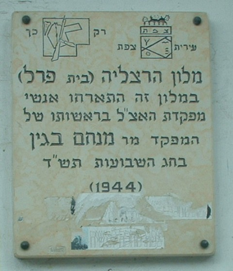 לוח זכרון על קיר מלון "הרצליה" בצפת